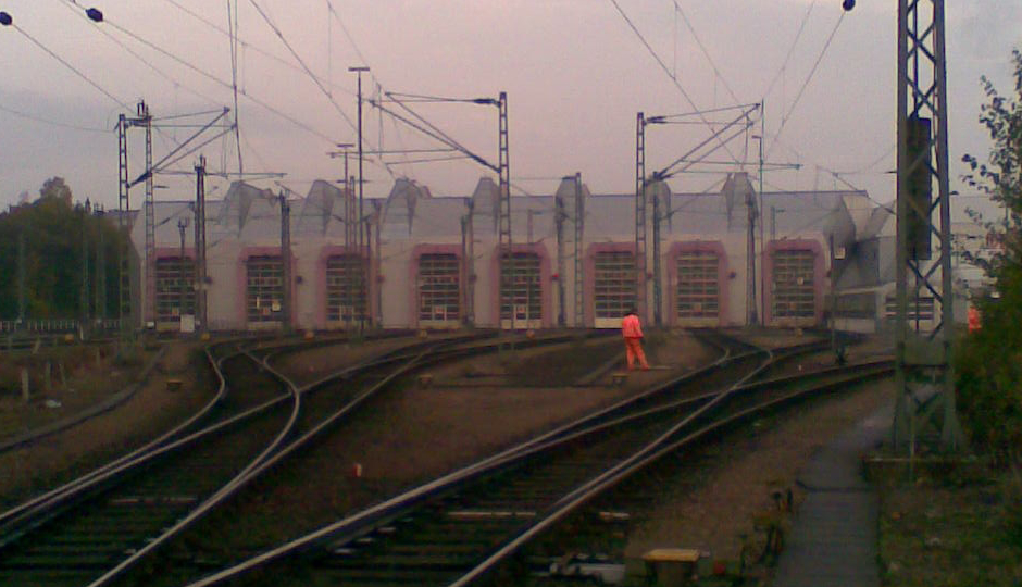 Bahnbetriebswerk Hamburg Eidelstedt Südseite - Instandhaltungswerk für ICE Züge der Deutschen Bahn